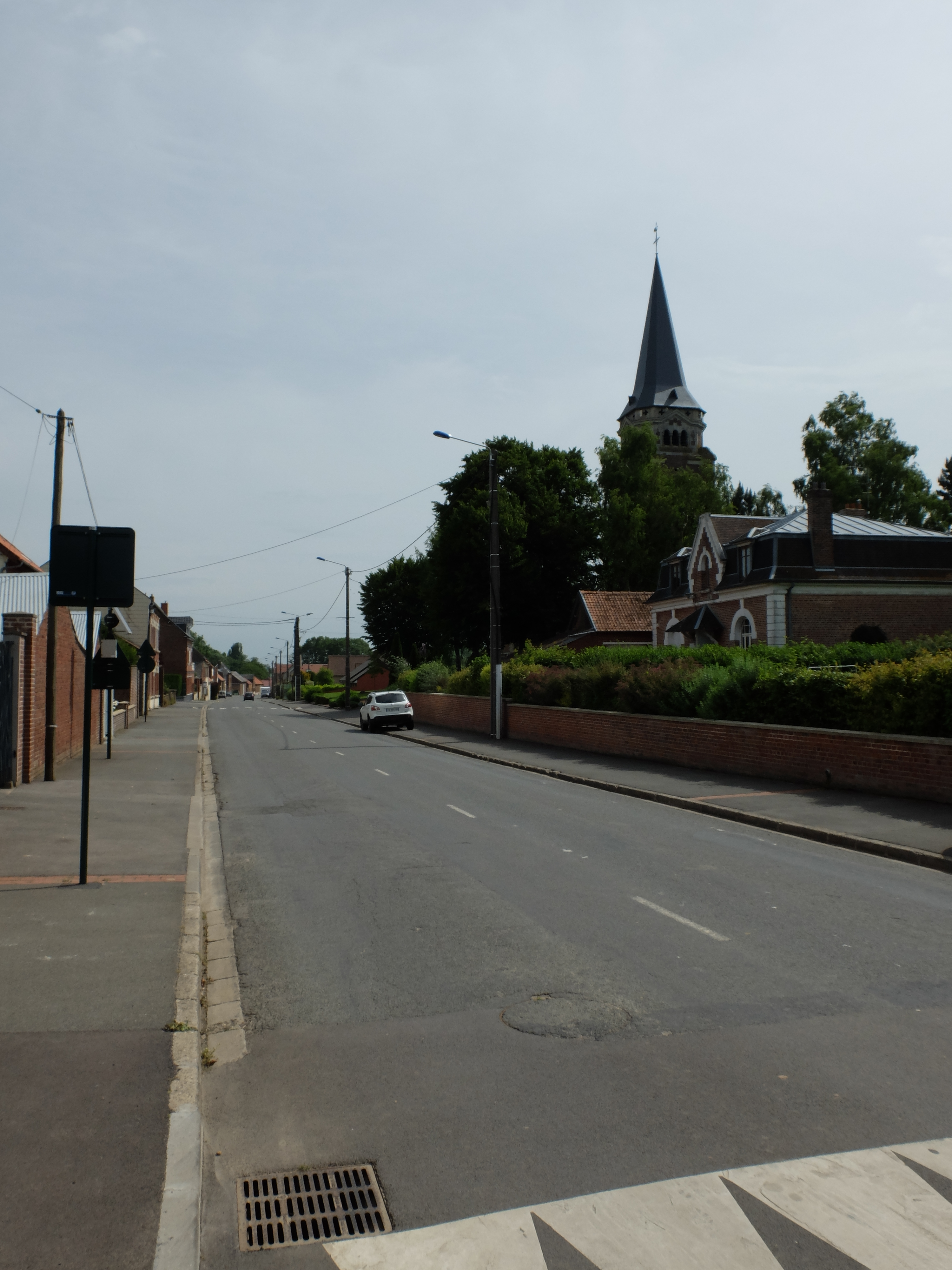 Vue de la Grand rue de Neuville-Vitasse.